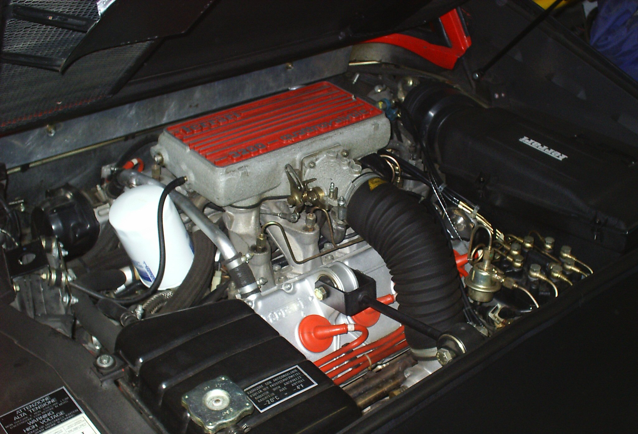 Ferrari V8 engine